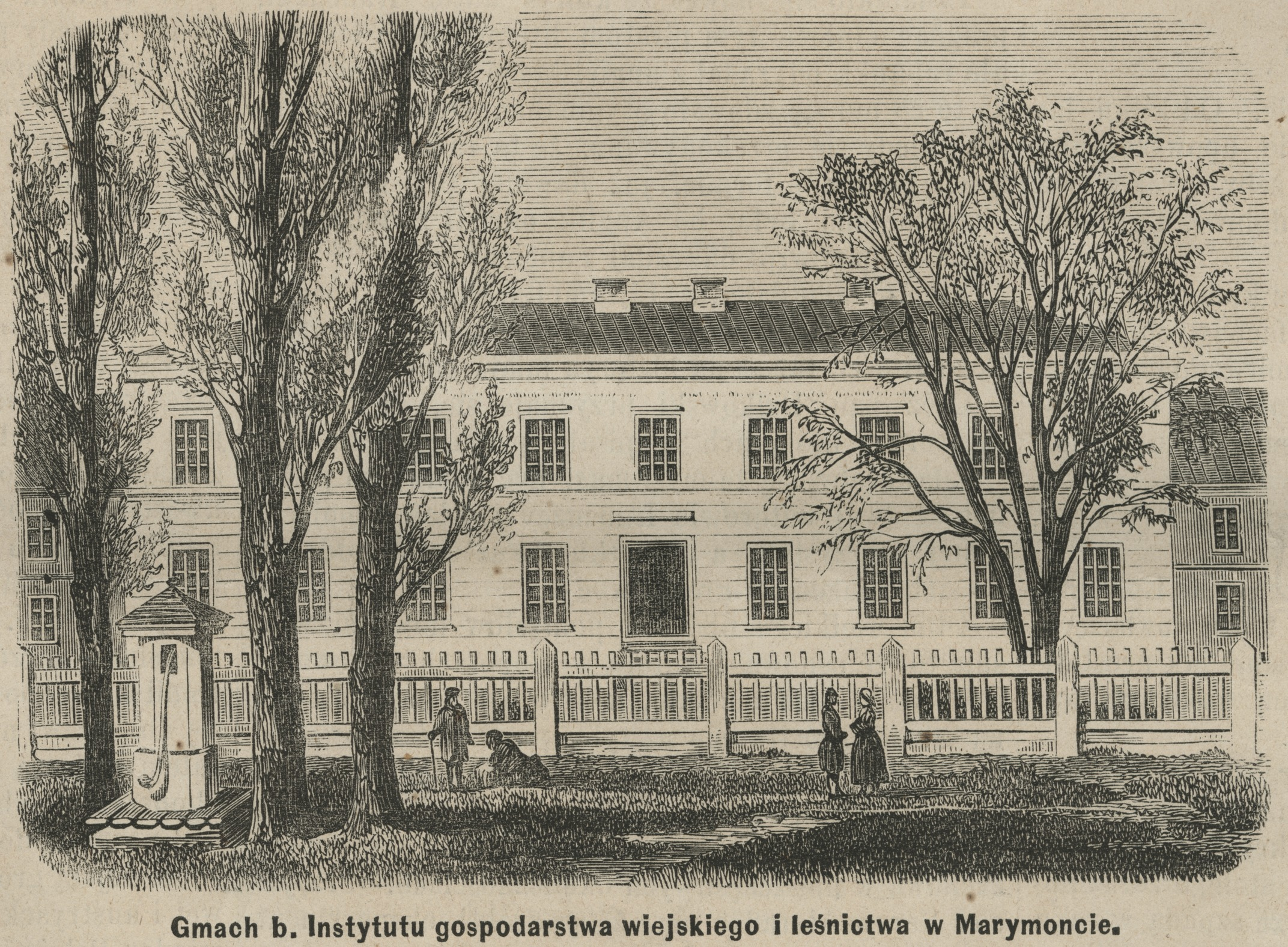 Gmach b. Instytutu Gospodarstwa Wiejskiego i Leśnictwa w Marymoncie